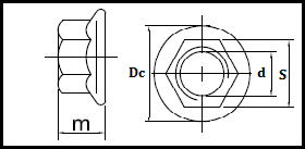 DIN 6923